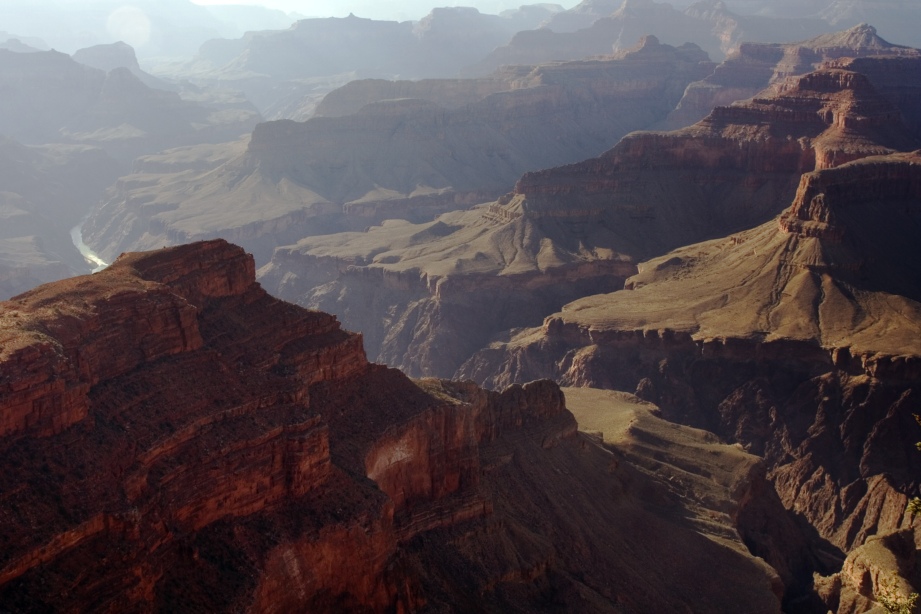 Schluchten des Grand Canyons